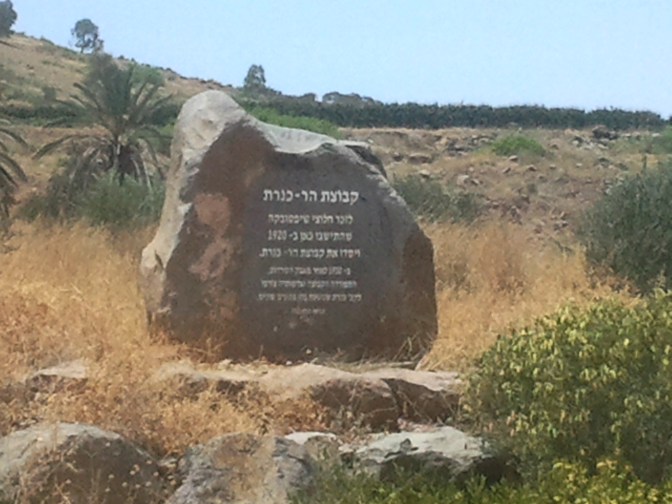 אנדרטה לזכר קבוצת הר-כנרת שהתיישבה ברכס פוריה בשנות ה-20 של המאה ה-20